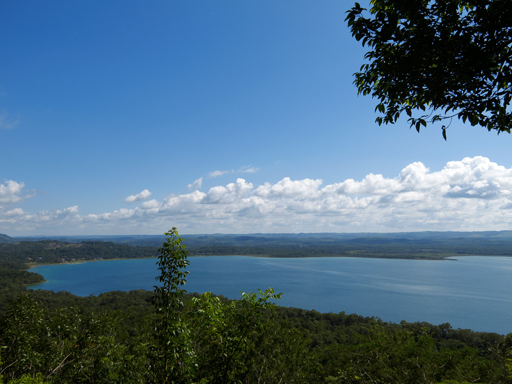 Vista del mirador en el biotopo "Cerro Cahui", Petén, Guatemala